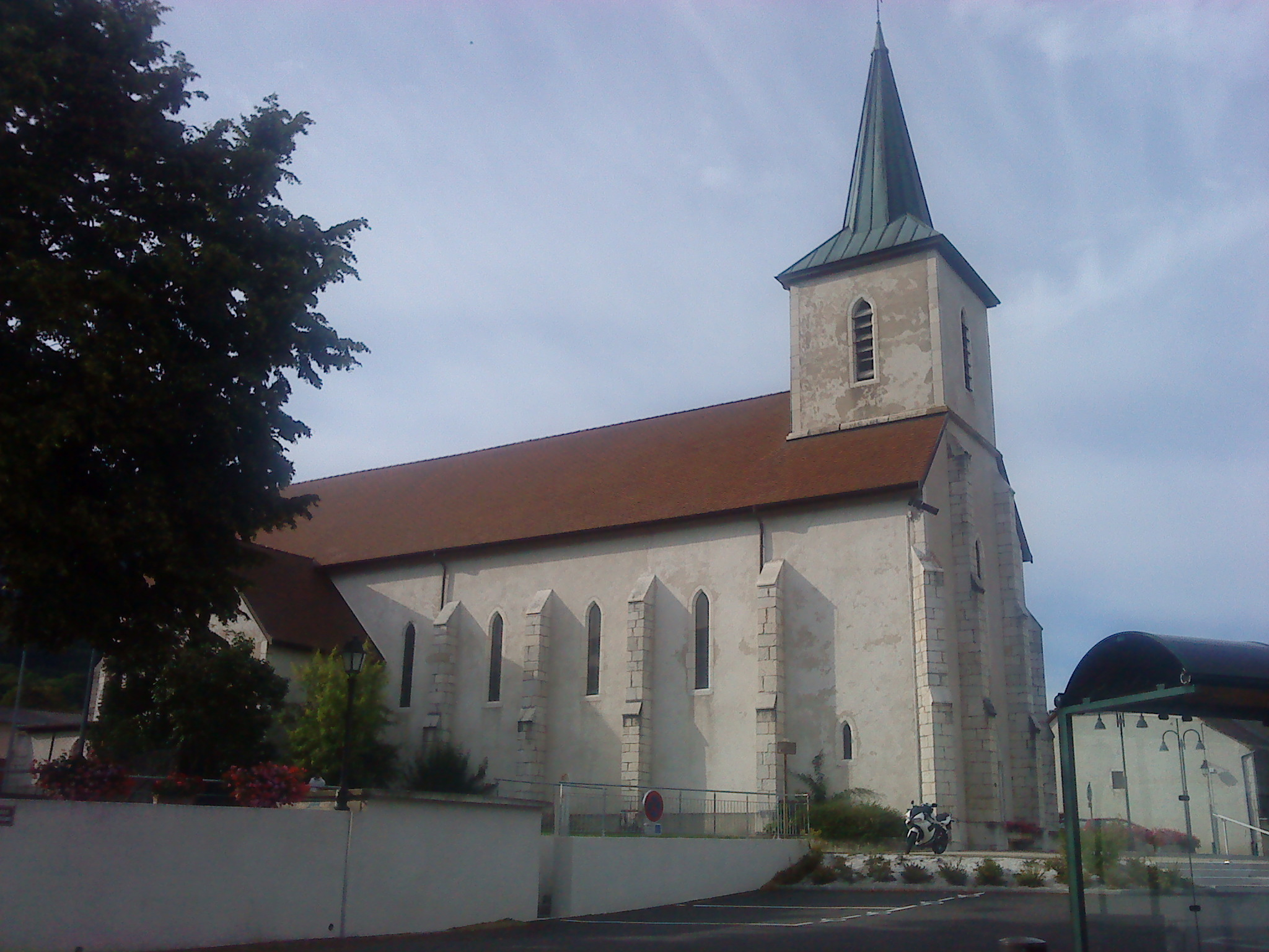 Eglise Saint-Antoine de Péron, Ain, France